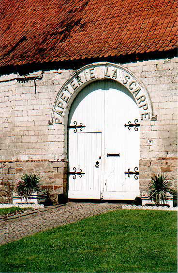 Ancienne fabrique de papier à Frévin-Capelle.